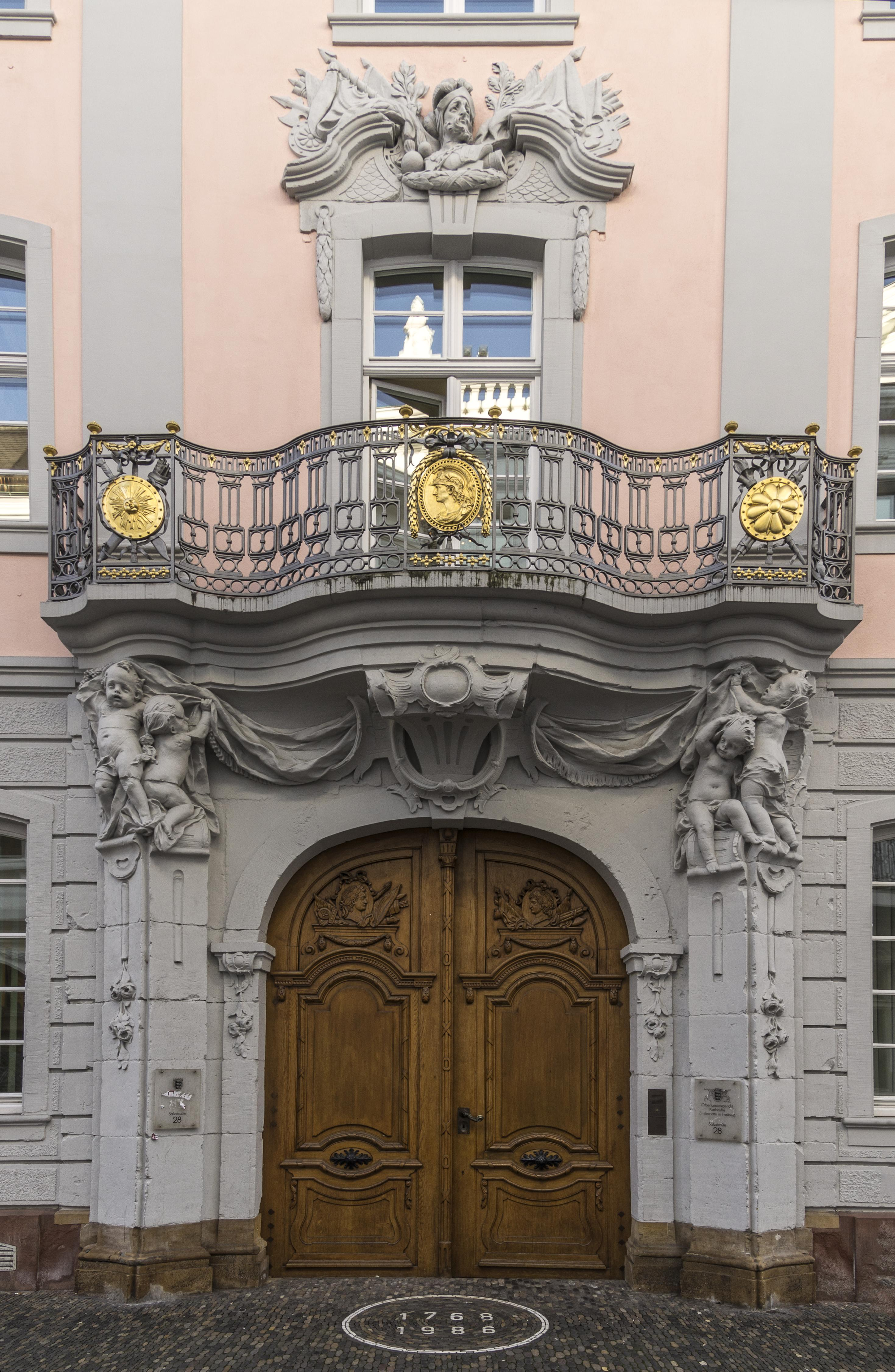 Bilder aus Freiburg im Breisgau Details vom Haupteingang der ehemaligen Deutschordenskommende, heute Oberlandesgericht Karlsruhe Senate Freiburg.